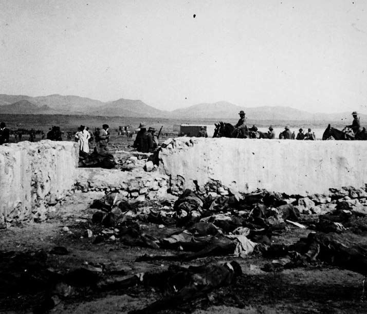 Enero de 1922. Guerra del Rif. Meses después de la batalla de Annual (julio-agosto de 1921) los restos continúan dispersos.